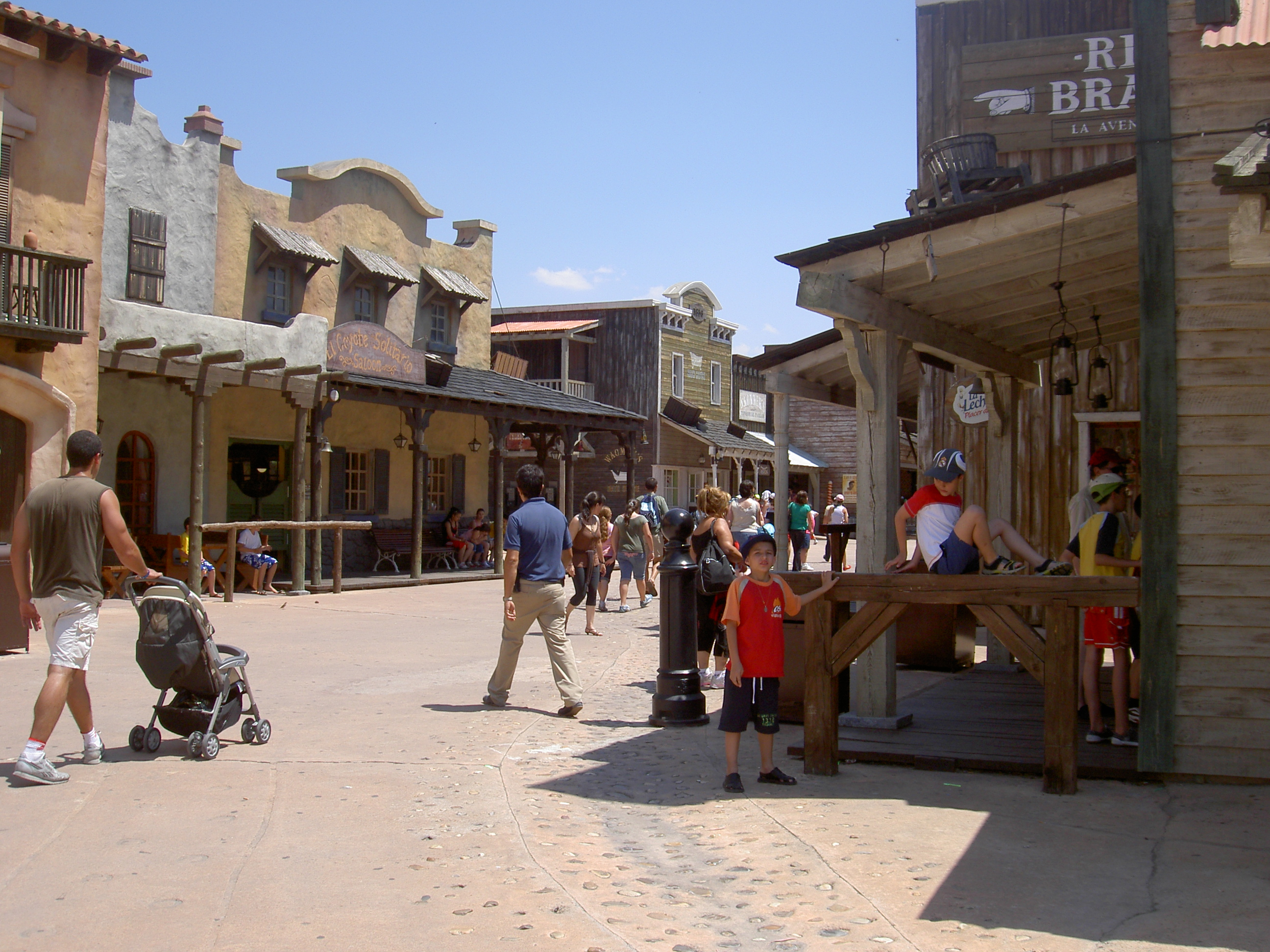 Parque Warner Madrid